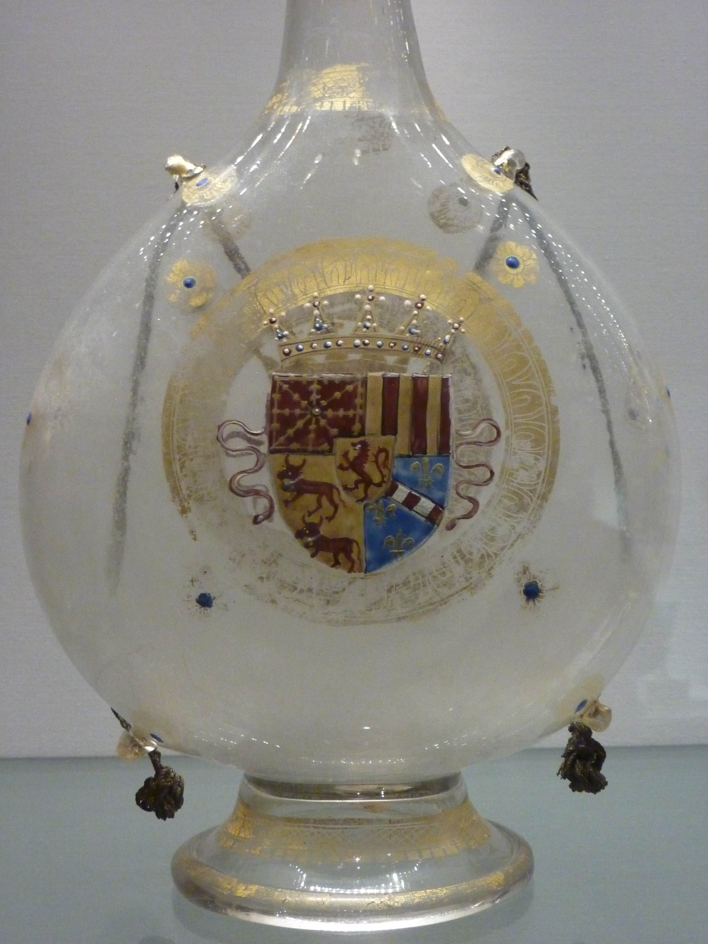 Venise, avant 1517 (Musée du Louvre)